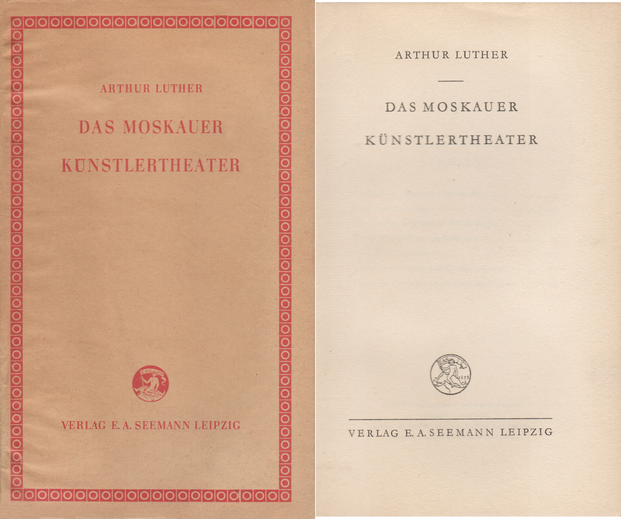 Das Moskauer Künstlertheater von Arthur Luther ist der Band 9 einer Kleinen Bücherei zur Geistesgeschichte. Das Buch berichtet über das Theaterleben des Schauspielhauses bis zum Beginn des Ersten Weltkrieges. Das kleine Büchlein mit 96 Textseiten erschien 1947 im Verlag E. A. Seemann Leipzig.